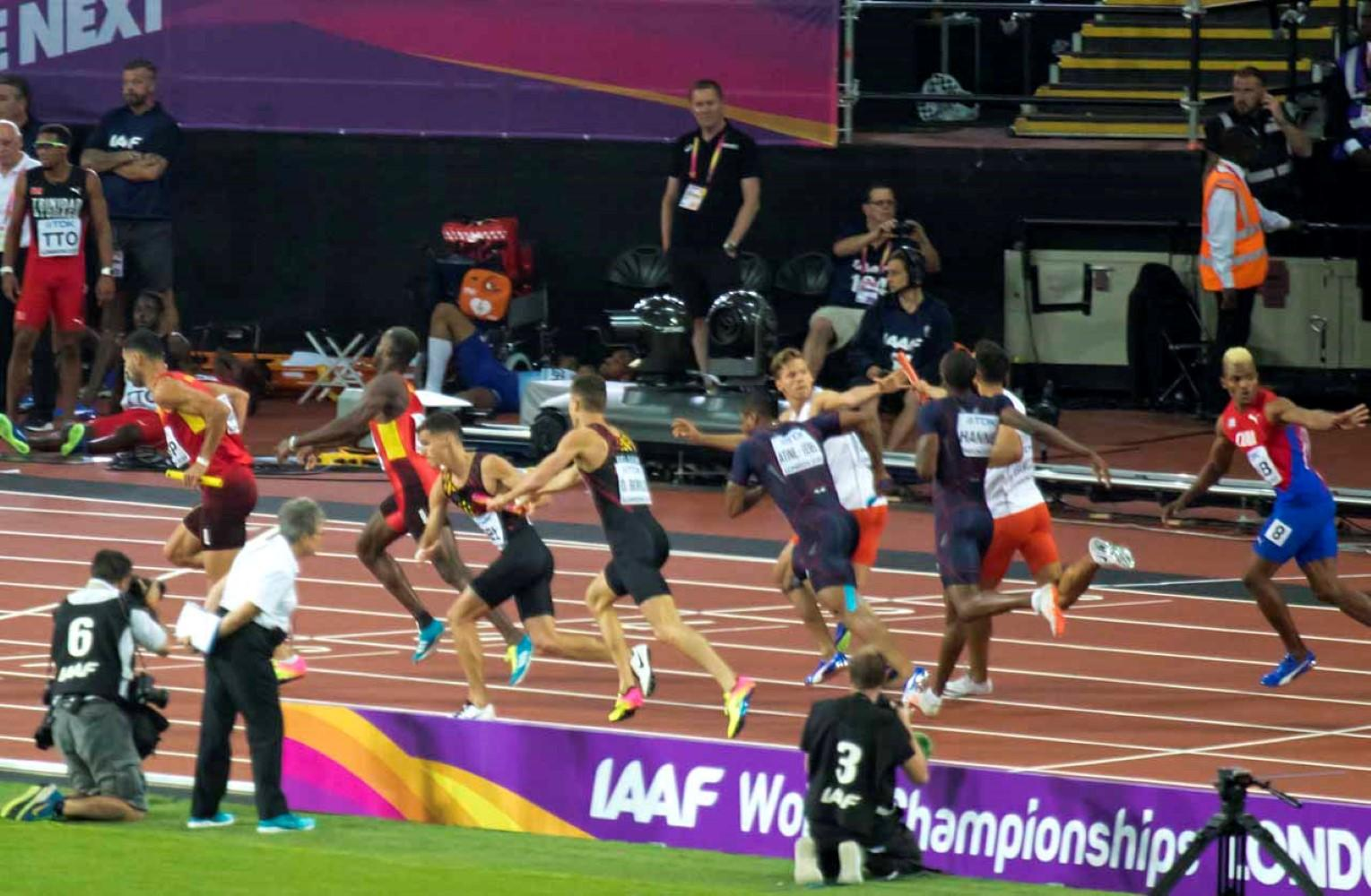 d9_20 finale 4x400m team belgium